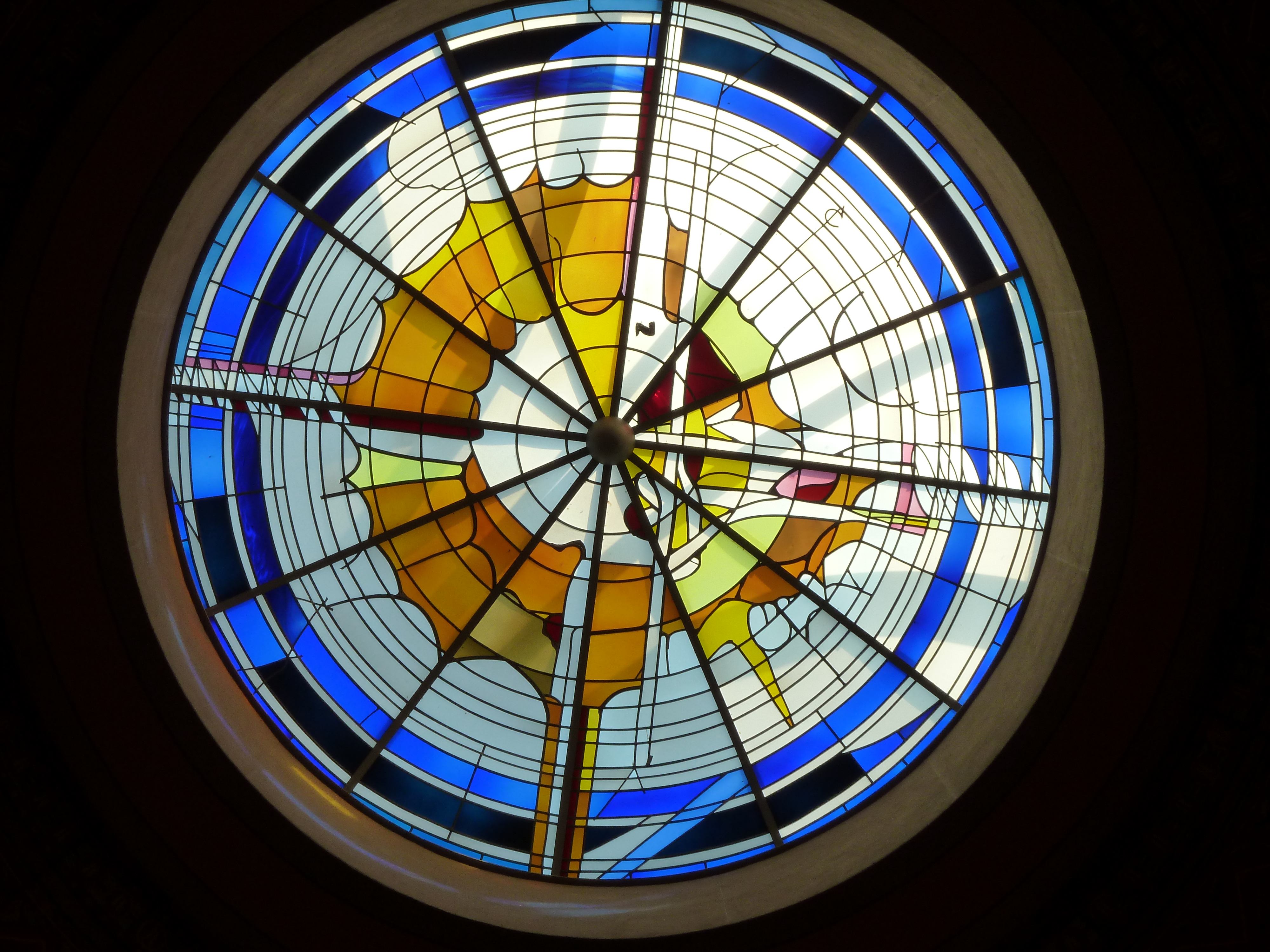 Fenster in der Kuppel der St. Petrus Kirche in Gesmold (Ende des 20.Jh.)